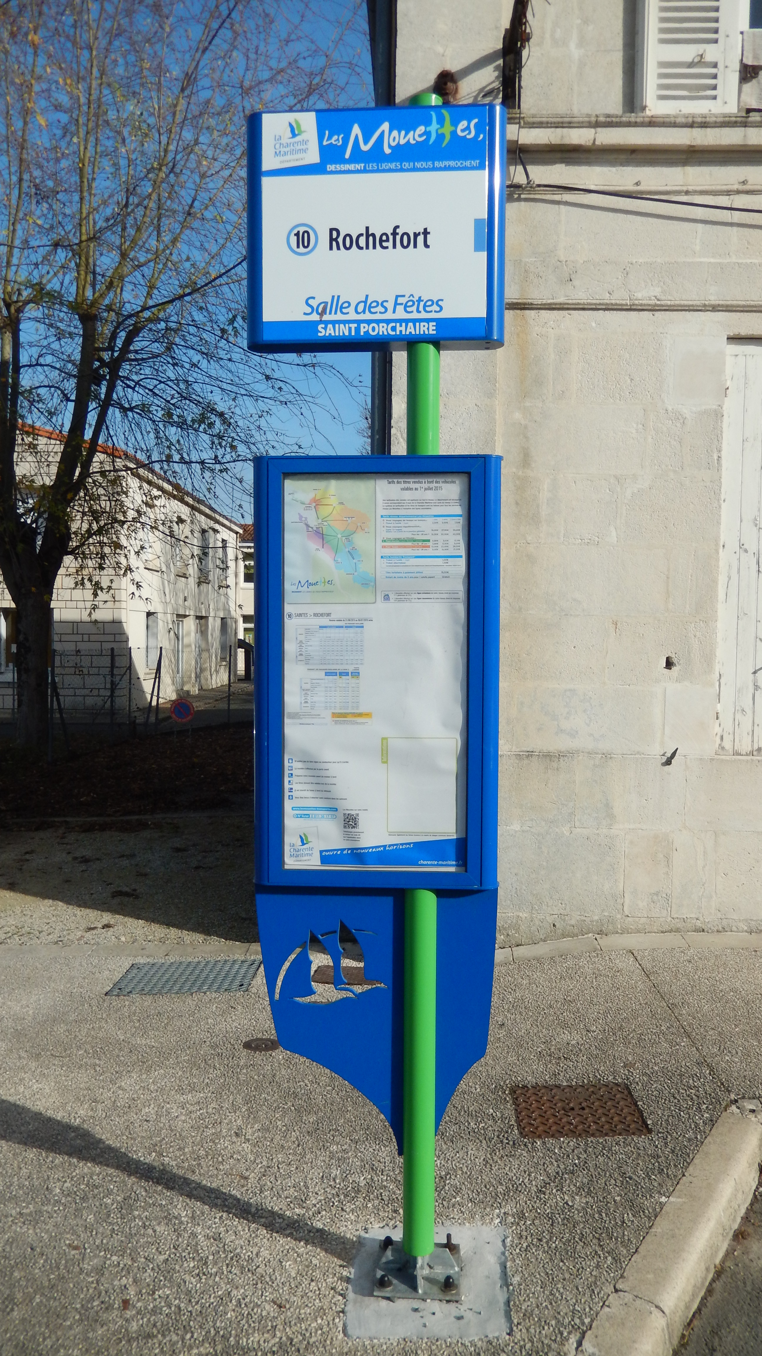 Saint-Porchaire (Charente-Maritime, France) — Un poteau signalant l'arrêt de bus de la salle des fêtes de Saint-Porchaire, sur la ligne 10 du réseau départemental Les Mouettes.